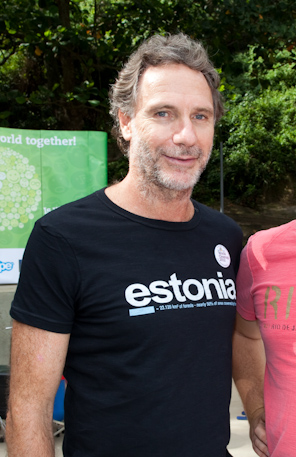 Oskar Metsavaht, Eesti aukonsul Rio de Janeiros